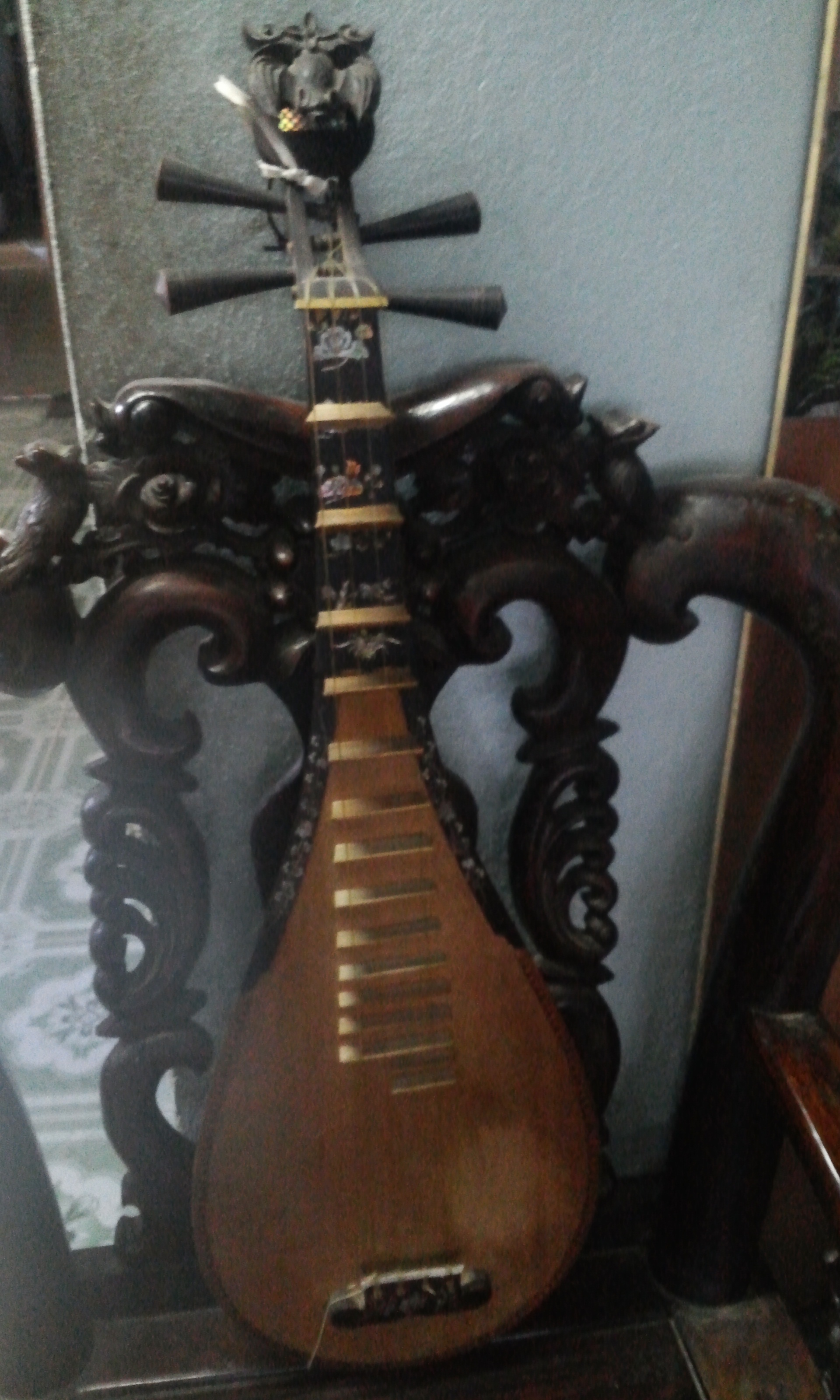 Cây đàn tỳ bà này đã sử dụng gần 40 năm nay